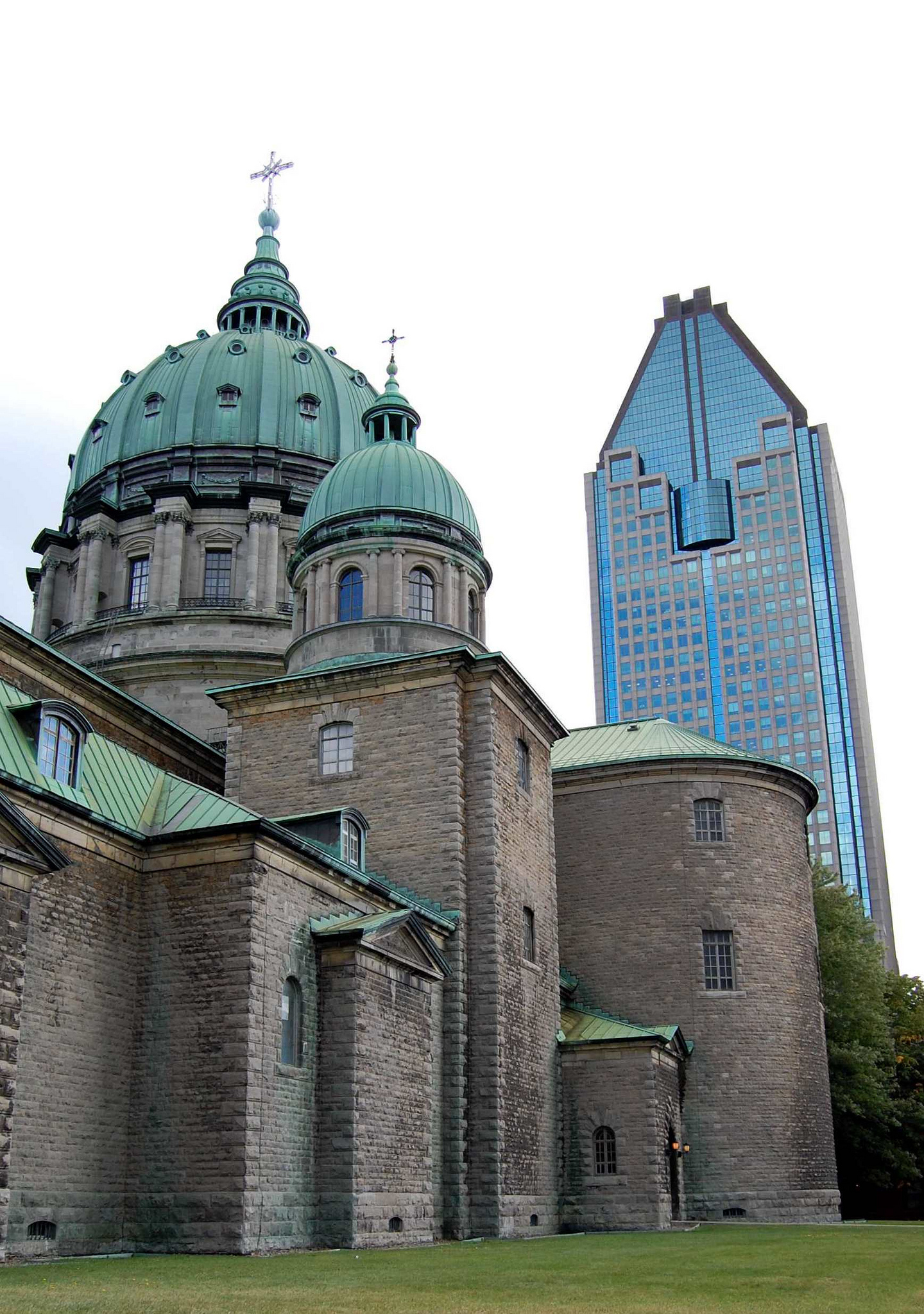 Cathedrale Marie Reine du Monde